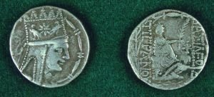 Տիգրան Բ Մեծի պատկերով արծաթե դրամ